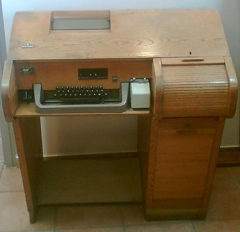 טלפרינטר מתוצרת סימנס. צילם דוד שי.